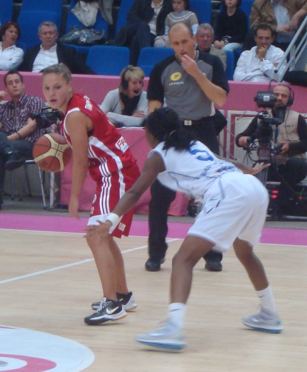 Les basketteuses françaises Ingrid Tanqueray (en rouge) et Aminata Konate (en blanc)